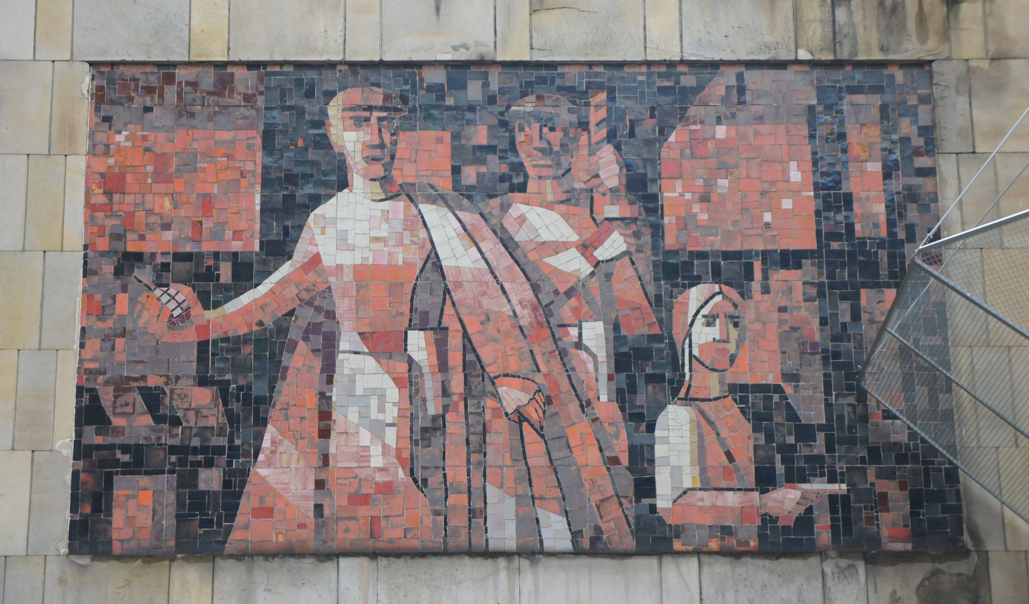 Mozaika upamiętniająca zamach na Cafe Club w Warszawie (obecnie budynek Empiku przy Rondzie de Gaulle'a). Zaprojektowana przez Władysława Zycha.